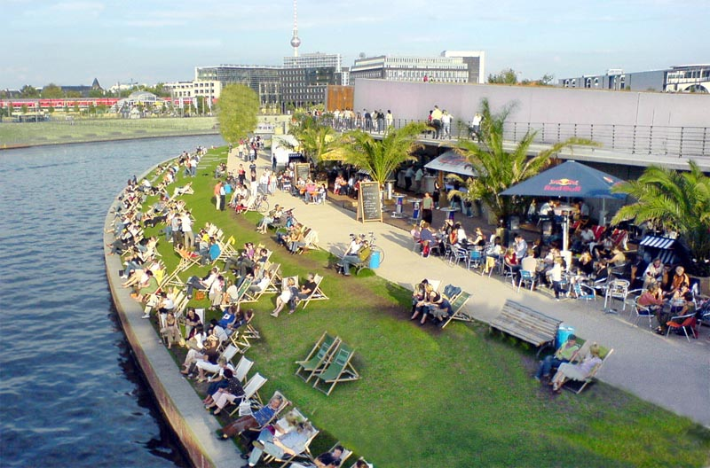 Eine Strandbar an der Spree in Berlin-Tiergarten. A beachbar in central Berlin at the river Spree.